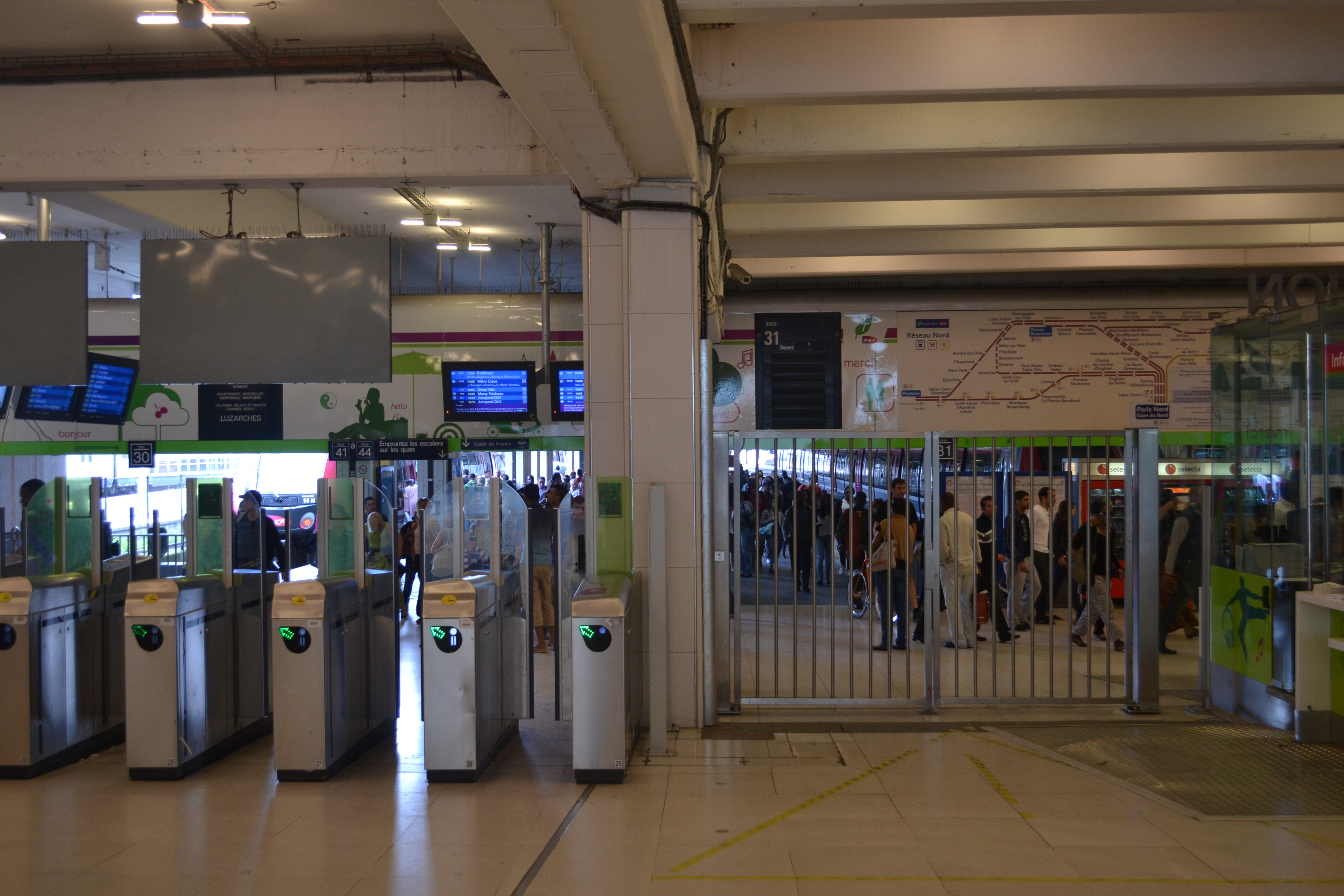 Toegans tot het Transilien-gedeelte van het Gare du Nord in Parijs.